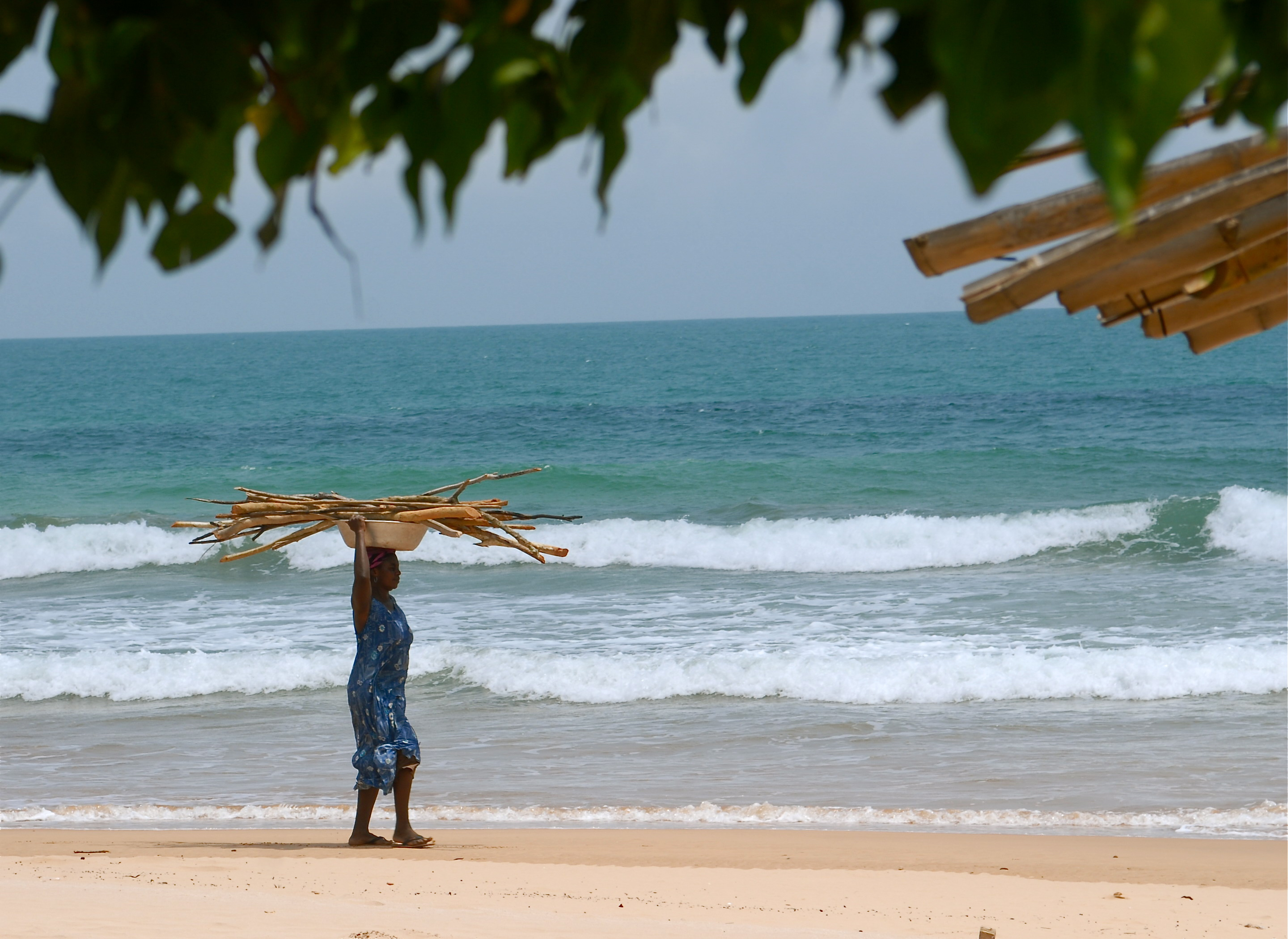 plage du Ghana pres de Takoradi